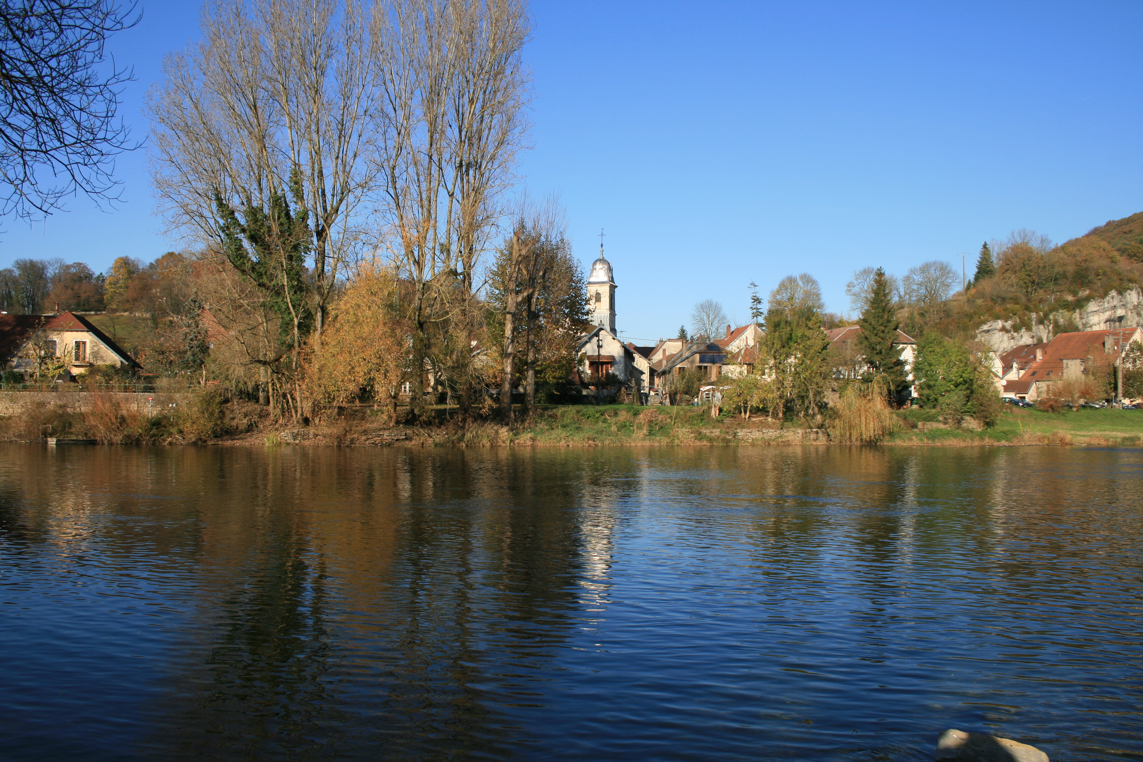 vue du village d'Avanne depuis la rive gauche du Doubs